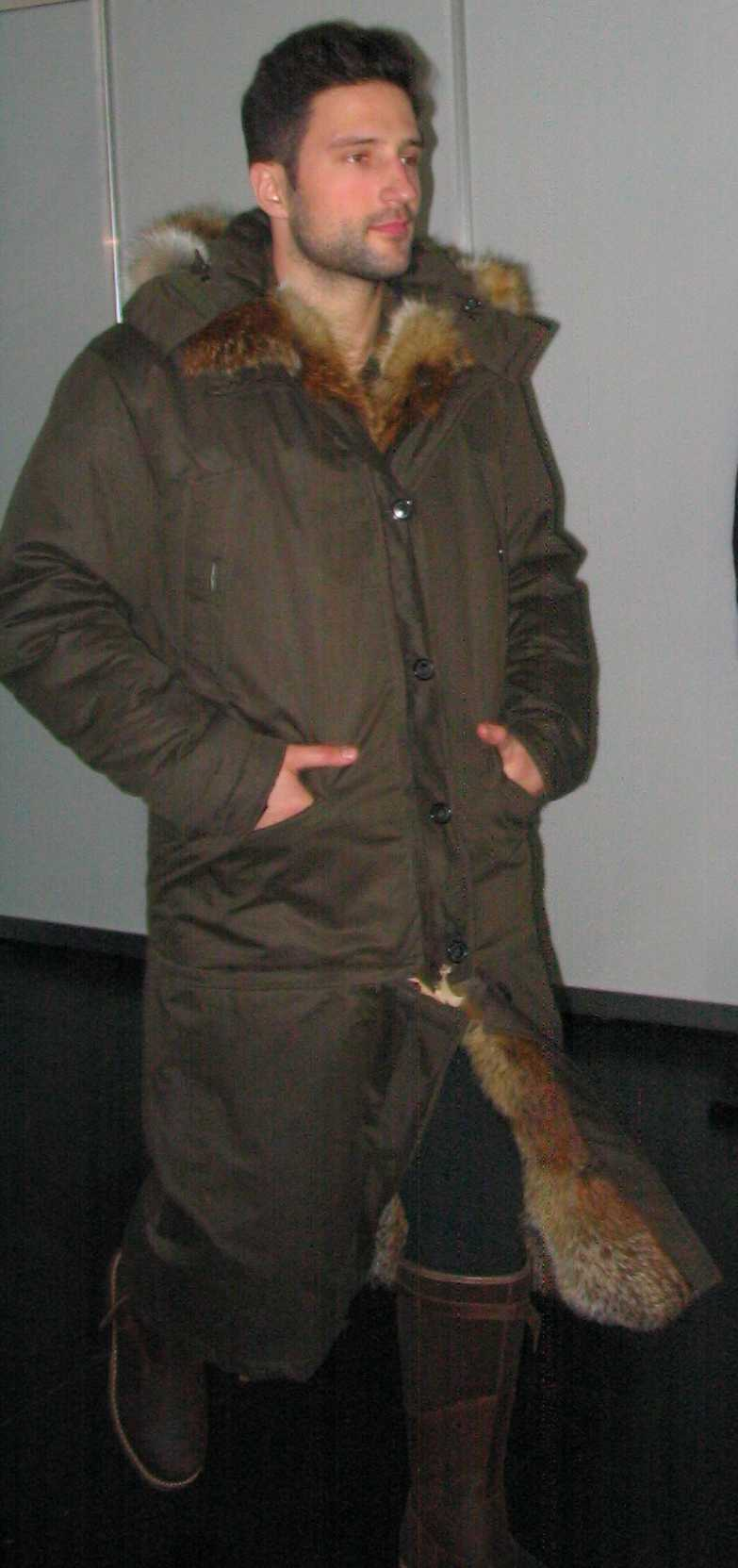 Jägermantel aus europäischem Rotfuchs und wetterfestem Stoff. Wendbar, mit zur Jacke abreißbarem Unterteil. Design und Ausführung: Reinold Pelzhandwerk, Memmingen. „Redfox-Fashion-Award“, ein Wettbewerb zur Förderung der Nutzung der anfallenden einheimischen Felle, insbesondere der Rotfuchsfelle. Teilnahmeberechtigt waren die Mitglieder des Zentralverbands des deutschen Kürschnerhandwerks und die Kürschner Österreichs, der Schweiz und der Niederlande. Sponsoring u. a. durch die Zeitschrift „Wild und Hund“, Messe „Jagd und Hund“. Anlässlich und auf der Messe „Jagd und Hund“, Dortmund Westfalenhallen, 29. Januar bis 3. Februar 2013.